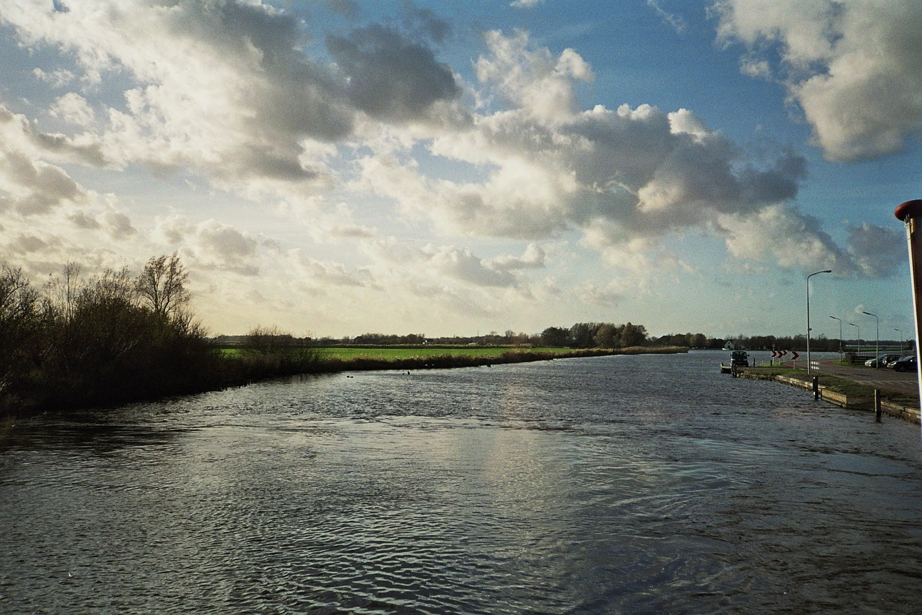 Ringvaart, Haarlemmermeer, the Netherlands.